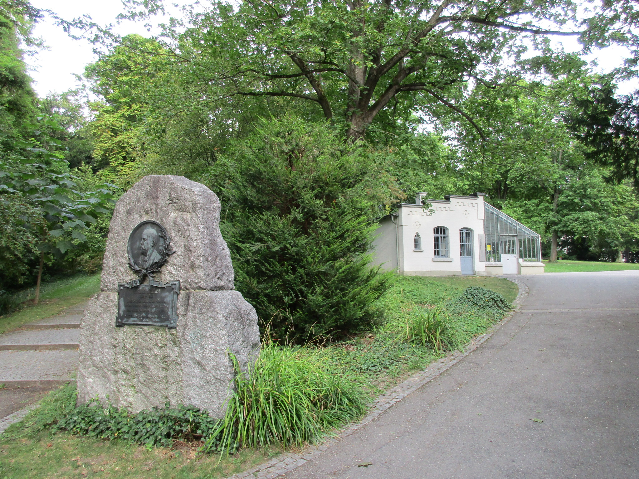 Gottlieb-Daimler-Gedächtnisstätte